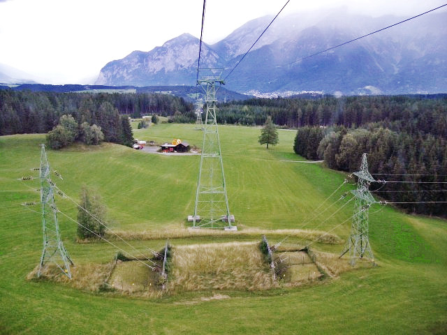 Kreuzung der Patscherkofelbahn (Seilbahn) mit der 110-kV-Bahnstromleitung Fritzens/Wattens–Unterberg (als „Freileitungstunnel“)